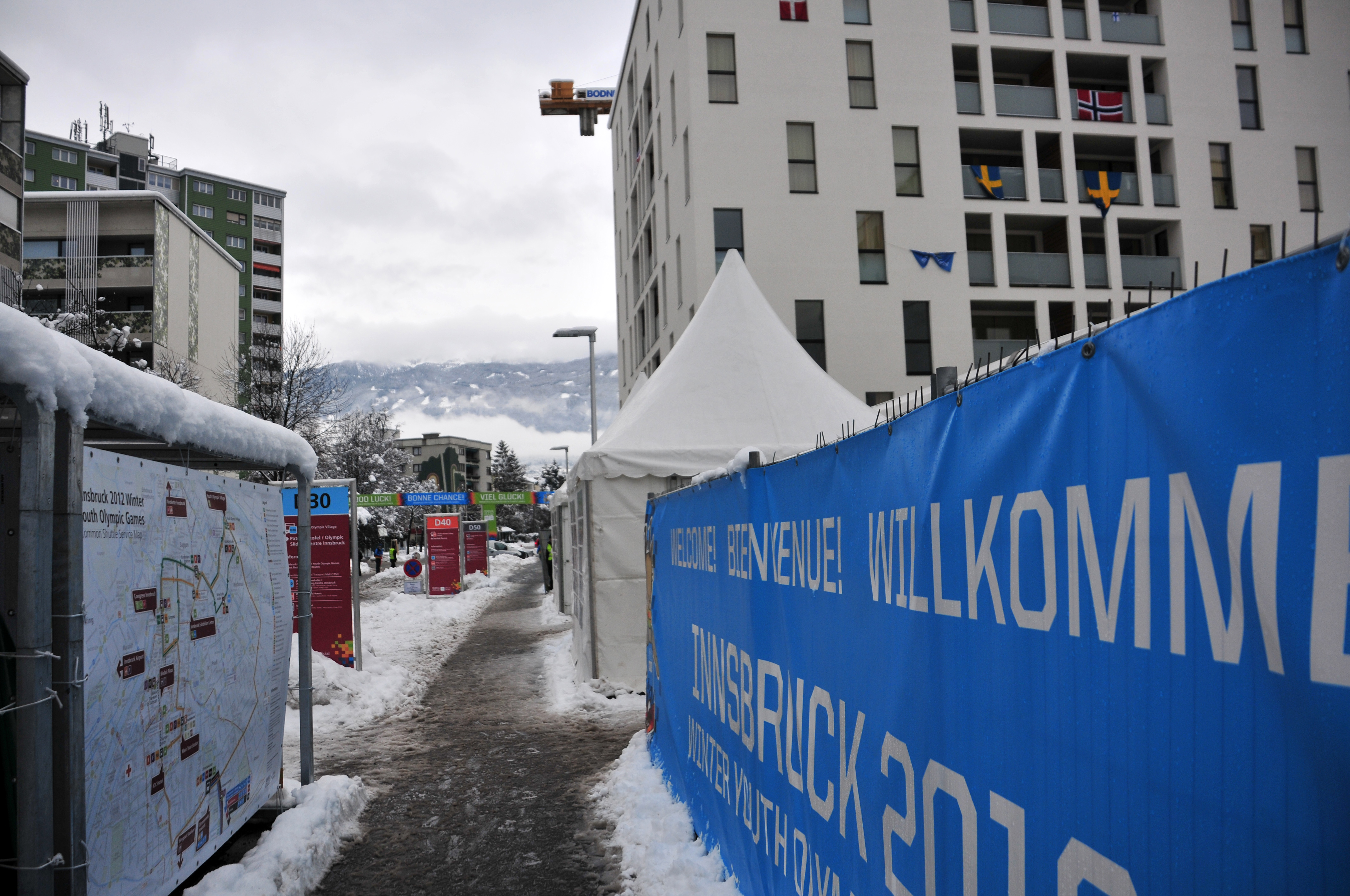 1. Jugendolympiade 2012 Innsbruck Erste Olympische Jugend- Winterspiele 201213. bis 22. Jänner in Innsbruck Dieses Foto wurde durch die Unterstützung von Wikimedia Österreich und die Twoonix Software GmbH ermöglicht.